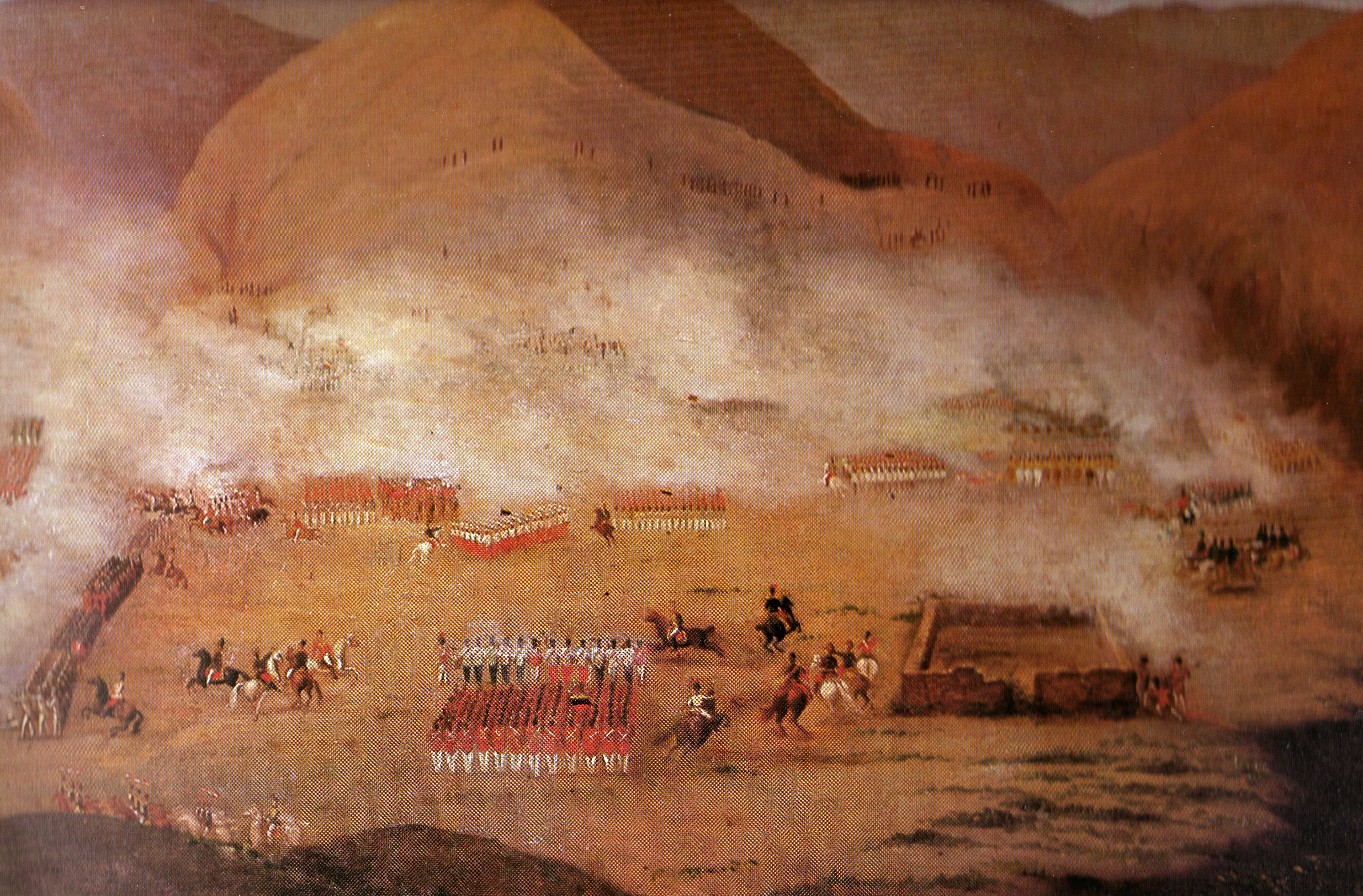 Tableau représentant la bataille d'Ayacucho, peint vers les années 1830 et exposé à la Quinta Magdalena à Lima.